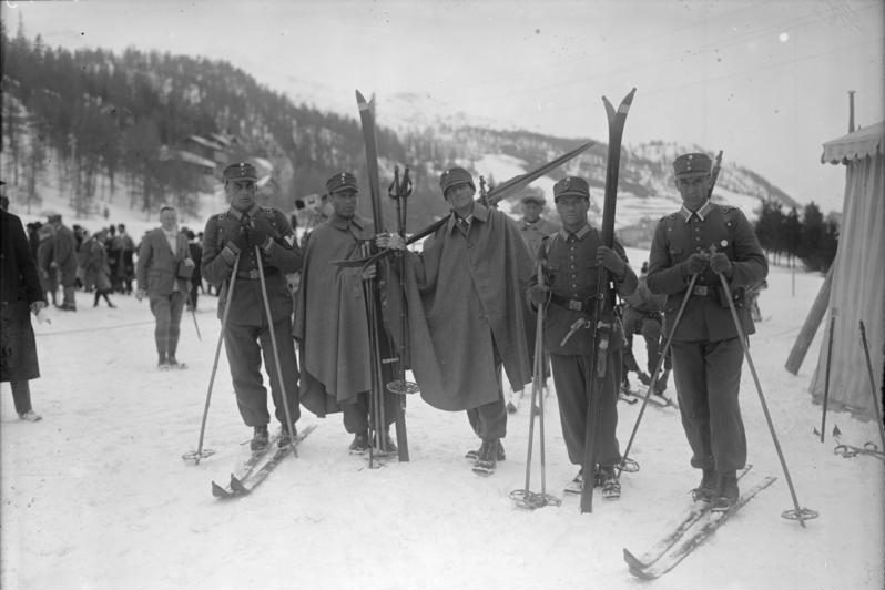 Die große Winter-Olympiade in St. Moritz! Erste Aufnahmen von unserem nach St. Moritz entsandten Sonder-Bild-Berichterstatter! Patrouillenlauf des Militärs, anläßlich der Olympiade in St. Moritz, bei welchem die norwegische Mannschaft siegreich blieb. Die deutsche Mannschaft belegte den 5. Platz. Die deutsche Mannschaft, welche unter Führung von Leutnant Raithel an dem olympischen Militär-Patrouillenlauf teilnahm und als Fünfte durchs Ziel ging. Die Leistung der deutschen Mannschaft ist in Anbetracht, dass die Gegner-Länder entstammten, in welchem der Militär-Skilauf viel länger als bei uns geübt wird, sehr hoch einzuschätzen.